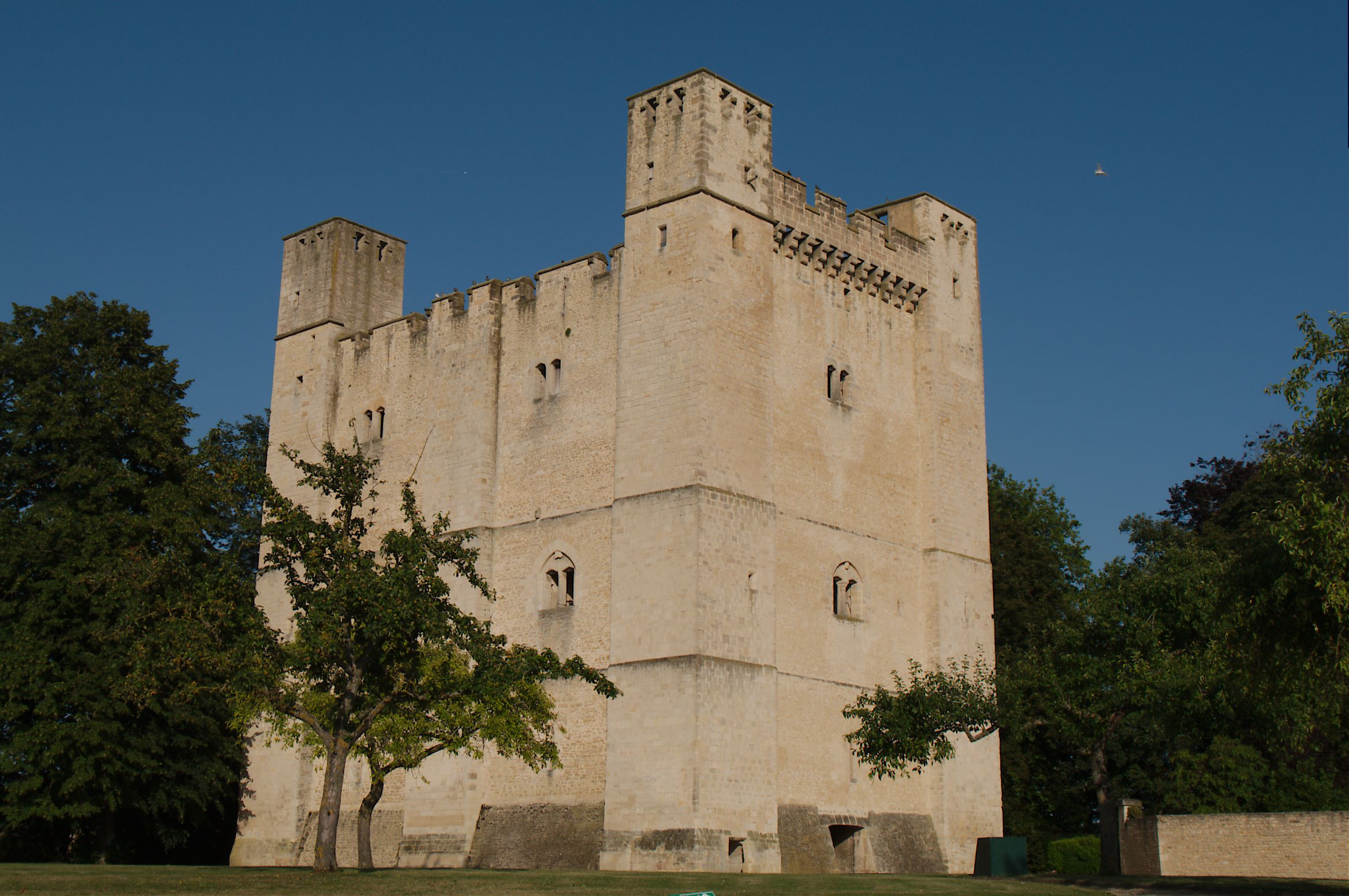 Donjon de Chambois (Orne, France), château du XIIe siècle .